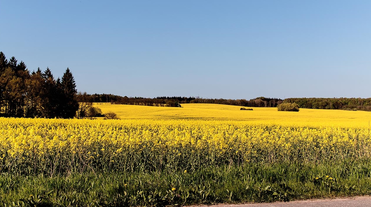 Blühendes Rapsfeld bei Neu Gaarz